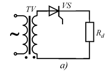 Файл запозичений з конспекту лекцій з курсу "Енергетична елетроніка" факультету електроніки НТУУ"КПІ".